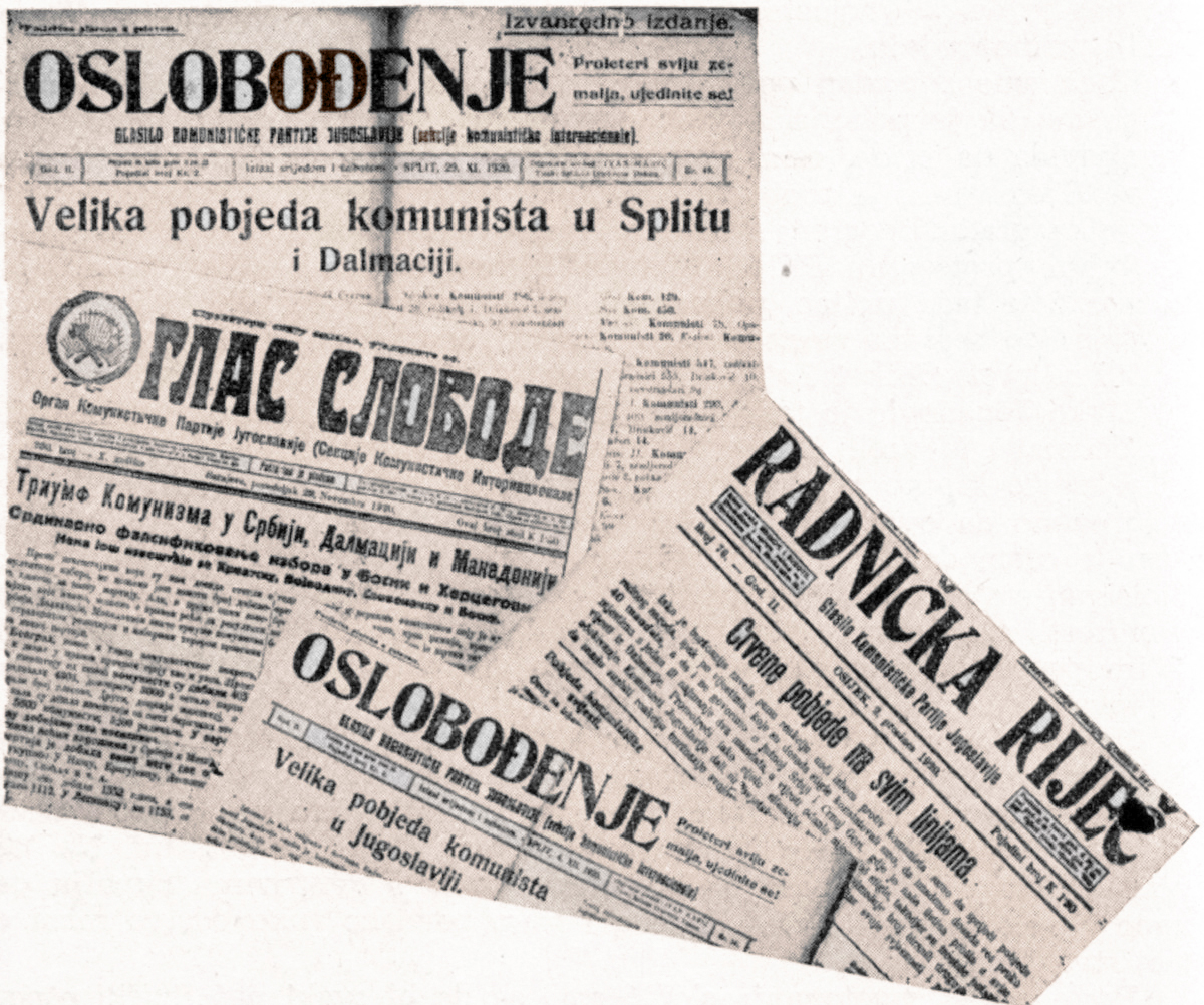 Srpskohrvatski / српскохрватски: Partijska štampa o velikoj pobedi Komunističke partije Jugoslavije na opštinskim izborima 1920. godine.